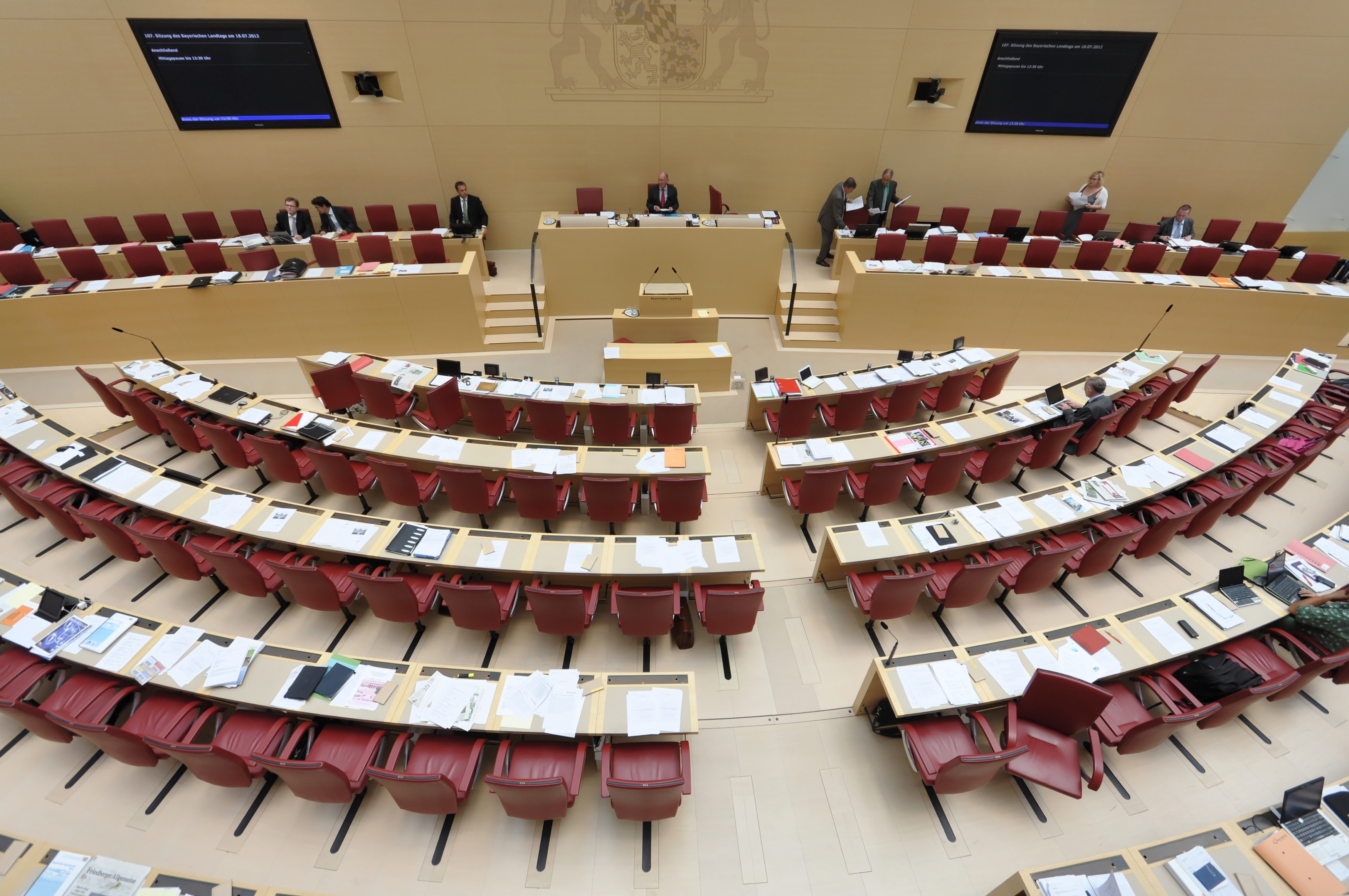 Landtagsprojekt-Bayern im Plenarsaal